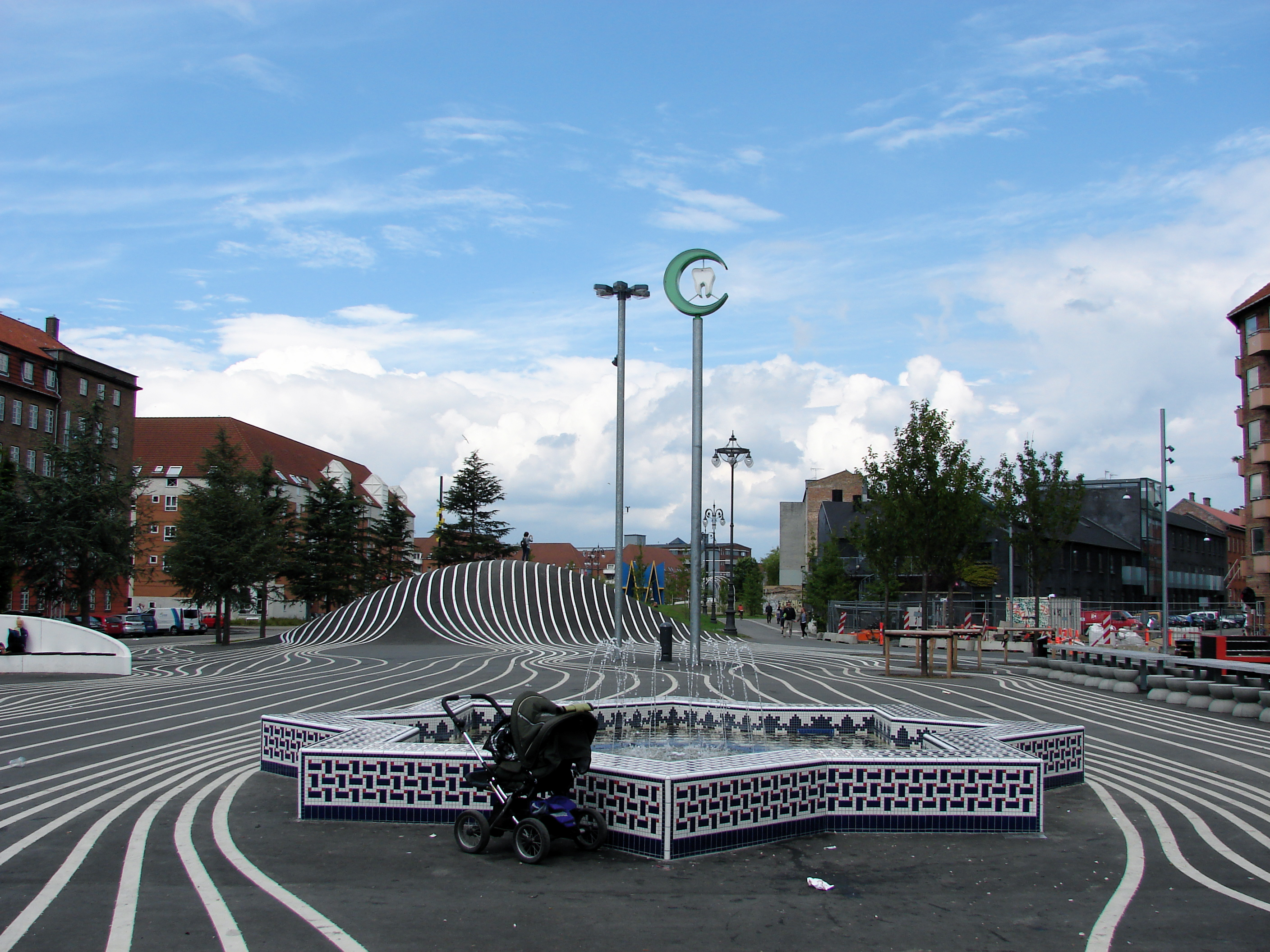 Superkilen park på Nørrebro, København. I forgrunden ses et springvand fra Marokko.